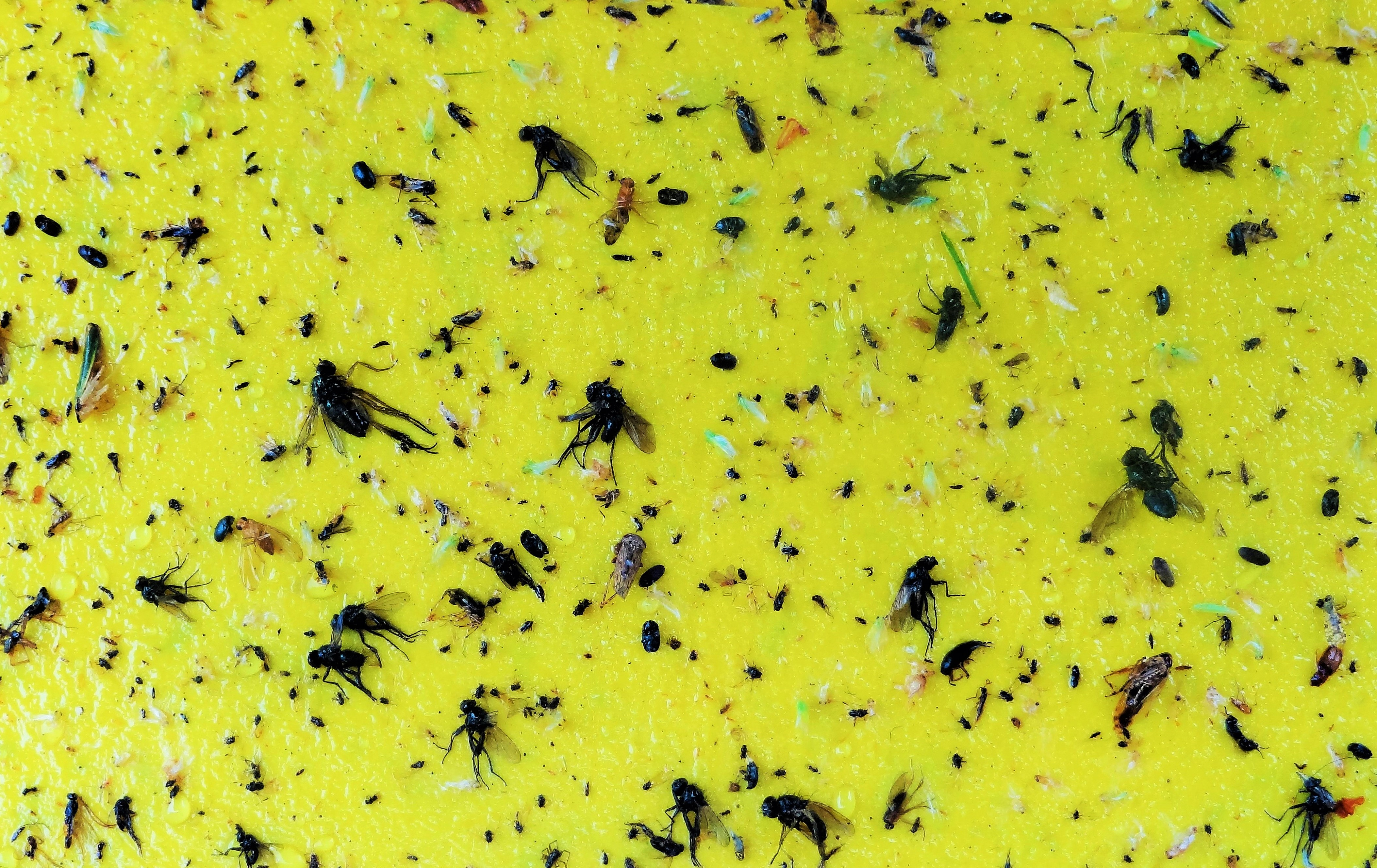 Tote Zikaden und Fliegen auf Gelbtafel/Dead cicadas an flies on yellow adhesive traps